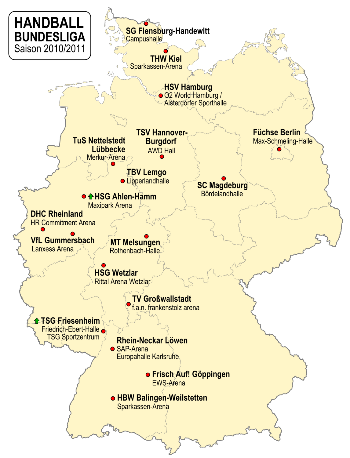 Karte der Vereine der Handball-Bundesliga-Saison 2010/2011